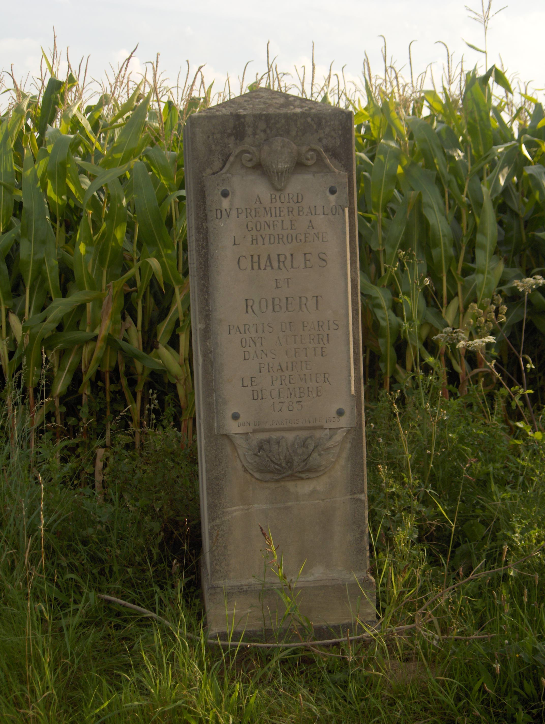 Stèle commémorant le voyage de Charles et Robert de Paris à Nesles-la-vallée (Val-d'Oise)